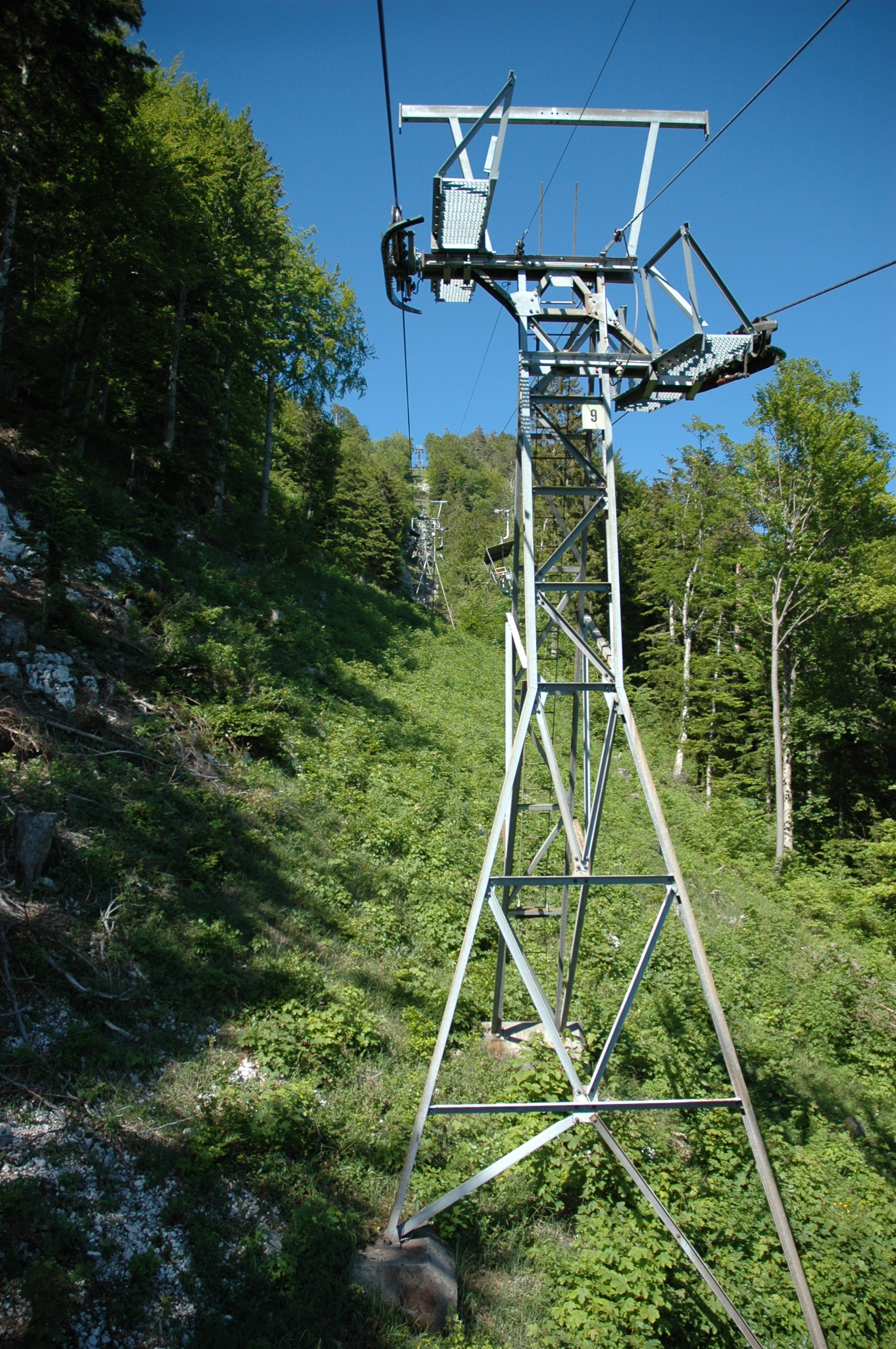 Stütze der Sesselbahn Oberdorf-Weissenstein, Schweiz. / Supporting construction of chairlift Oberdorf-Weissenstein, Switzerland.